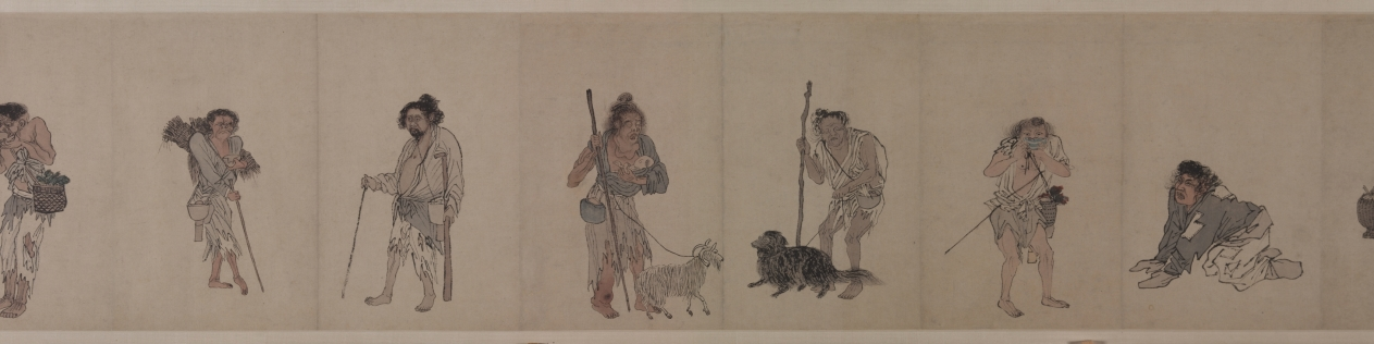 Малюнок китайського митця Чжоу Ченя 1516 року предтавників категорії населення Цзяньмінь